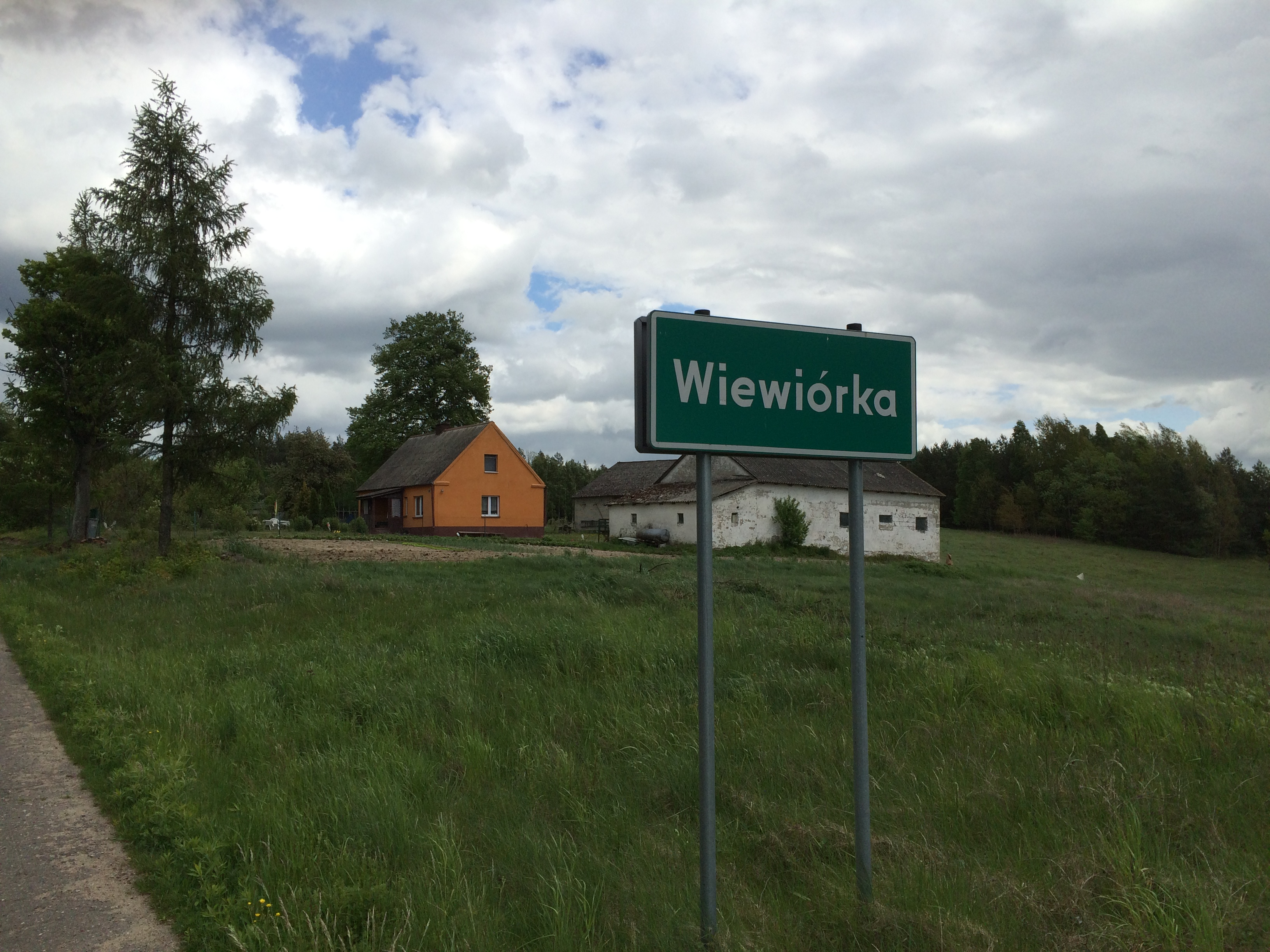 Entree Wiewiorka